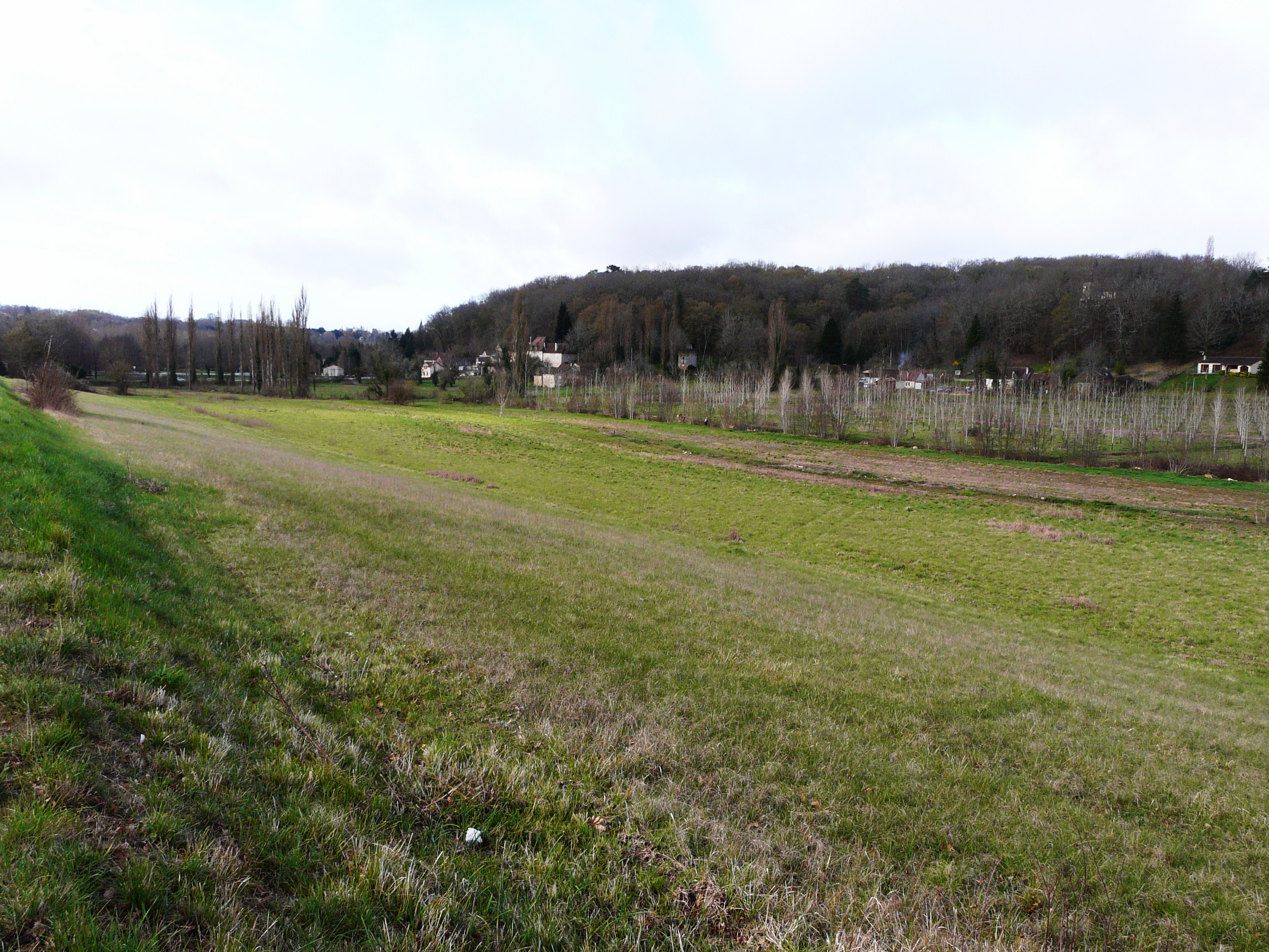 La vallée de la Seyze entre Lembras et Queyssac, auu niveau de la Ribeyrie, Dordogne, France.